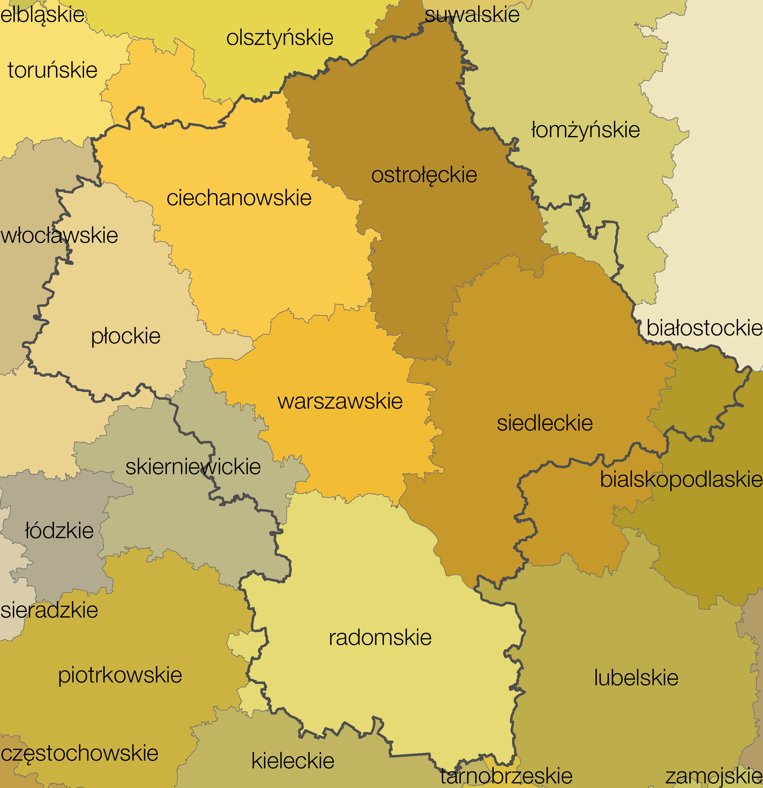 Województwo mazowieckie (od 1999) jako powstałe z województw podziału administracyjnego Polski z lat 1975-1998